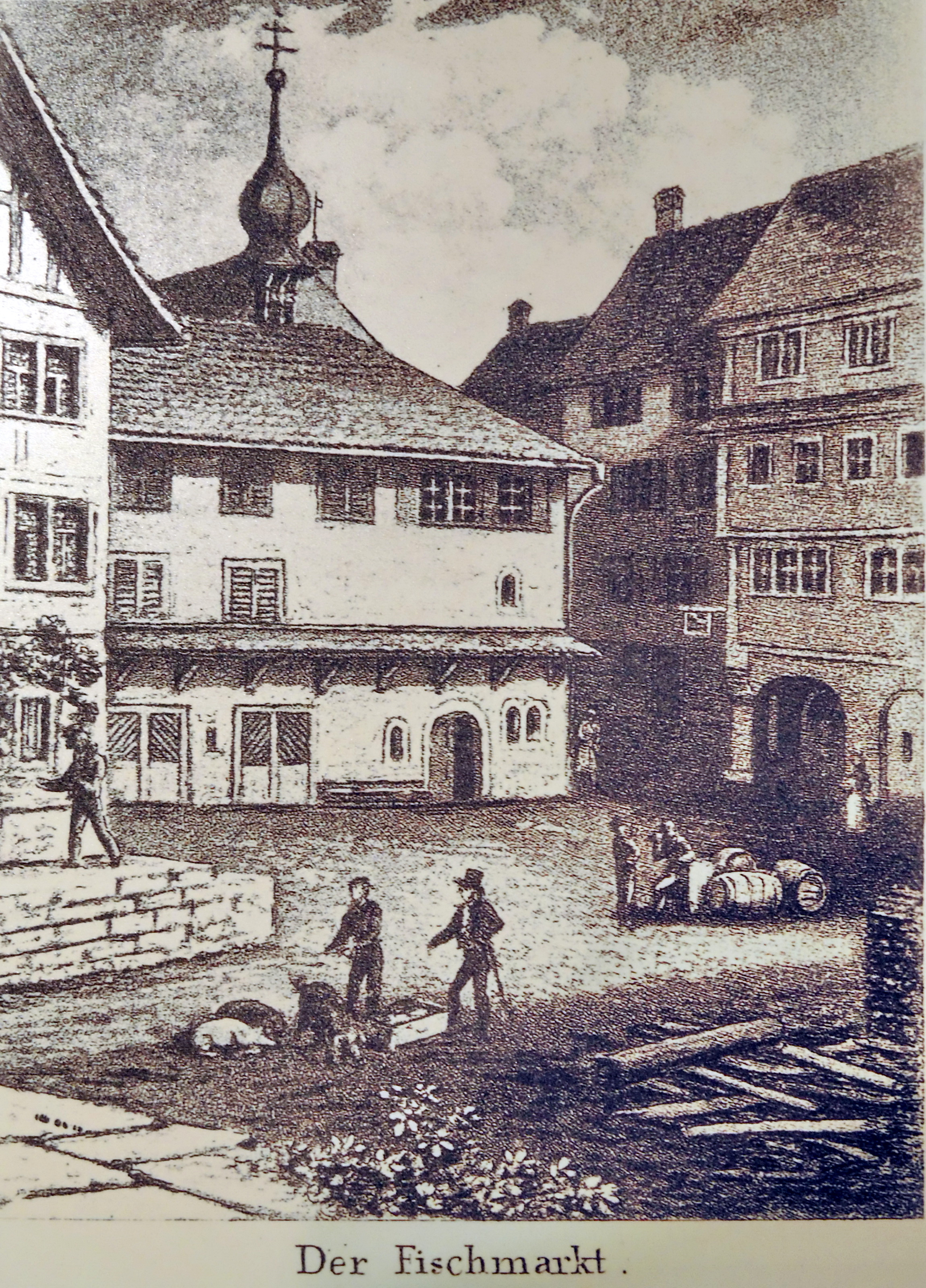 Rapperswil, Heiliggeist-Spital & Gasthof Hirschen at Fischmarkt. Aquatinta aus dem Sammelblatt 'Rapperschwyl' von David Alois Schmid und Franz Hegi.